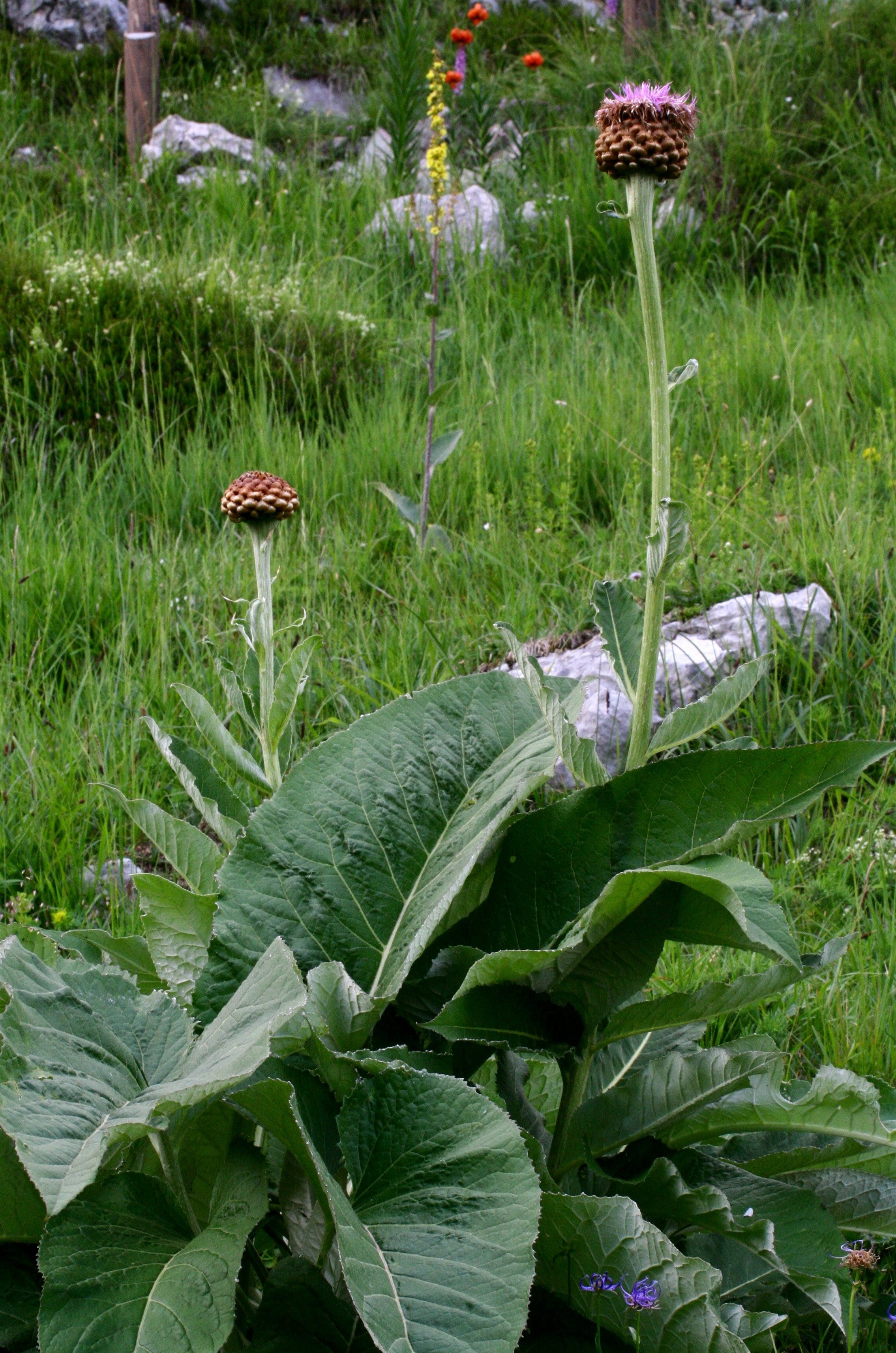 Località: "Giardino Botanico delle Alpi Orientali", Monte Faverghera (BL), 1500 m s.l.m